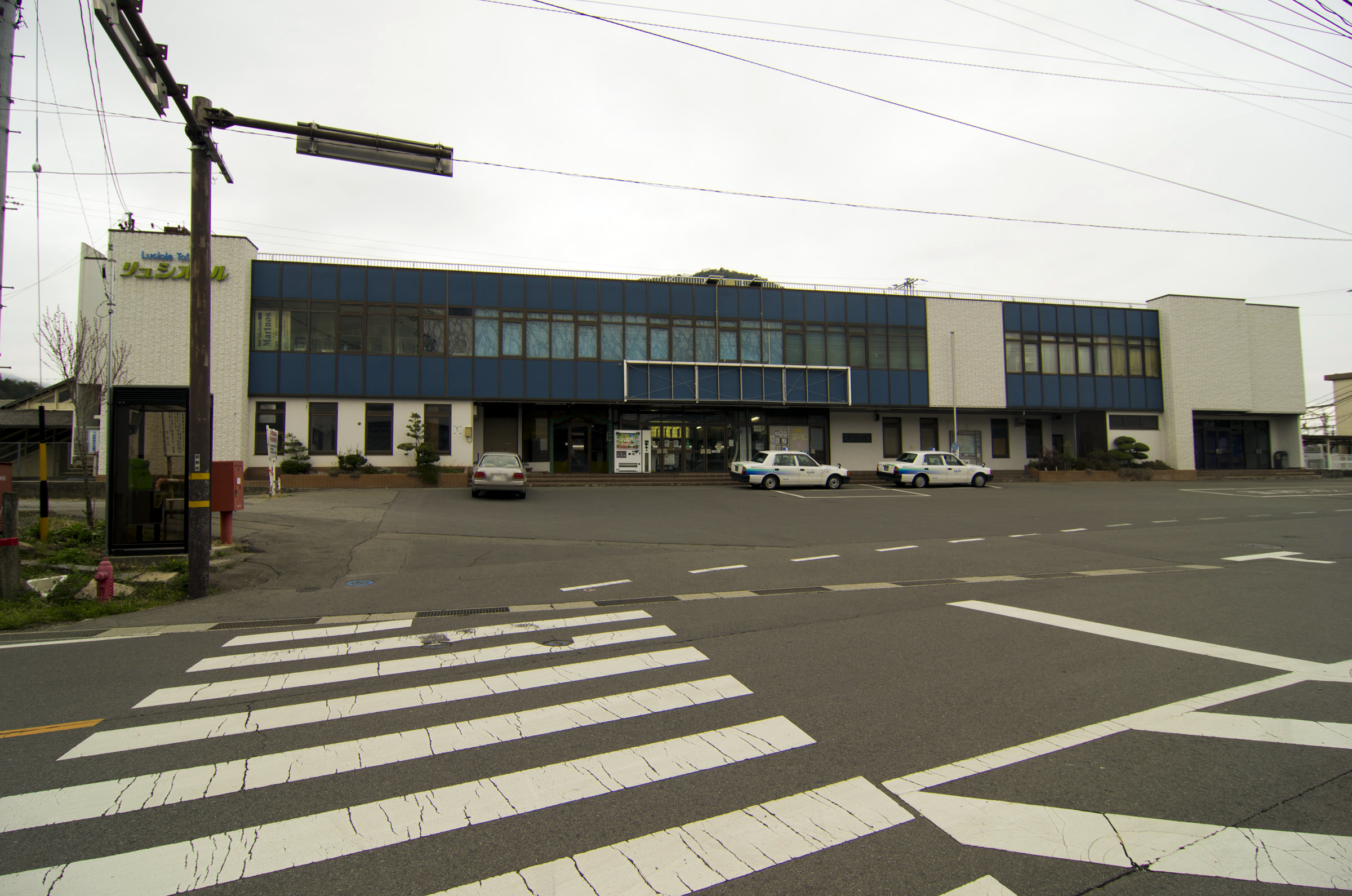 東日本旅客鉄道中央本線辰野駅 東海旅客鉄道飯田線辰野駅